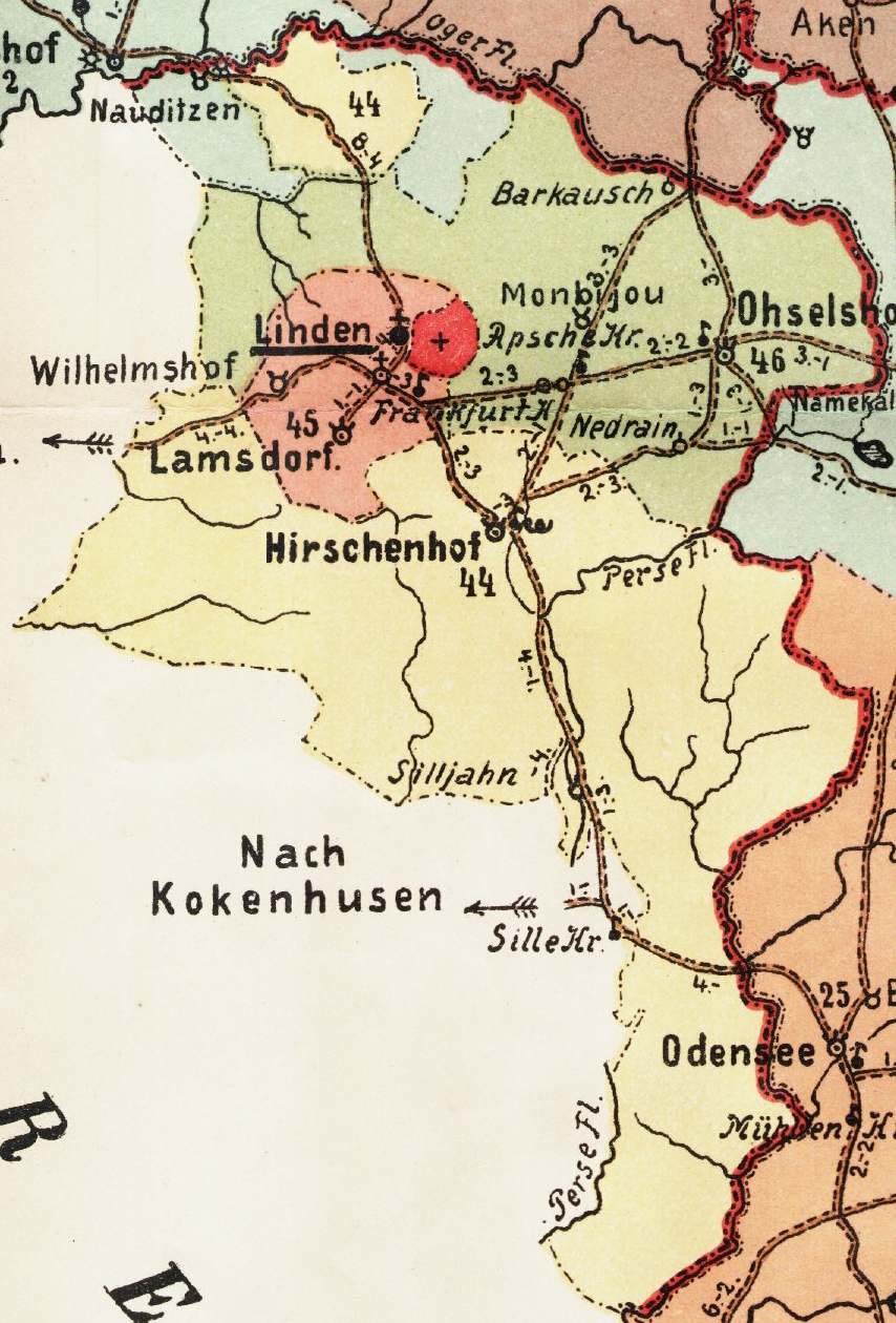 Liepmuiža kihelkonna mõisad 1903. aastal.